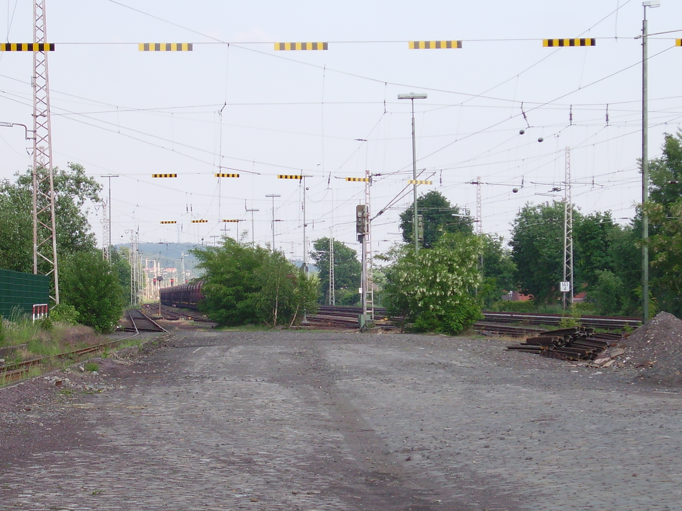 Güterbahnhof Esch mit Abstellgleisen des Bergwerks Ibbenbüren, im hintergrund ist der Rochusberg oberhalb der Stadt Ibbenbüren zu erkennen.